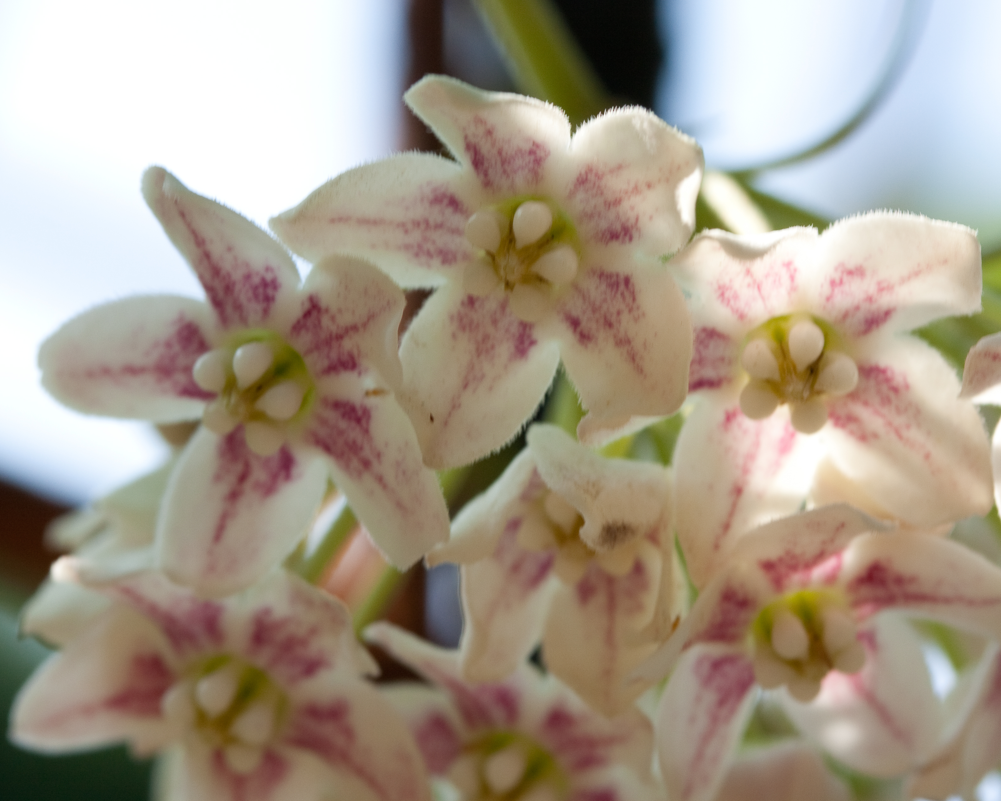 Fleurs de Dregea sinensis - Jardin des Plantes - Paris - France